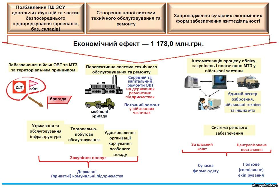 Удосконалення матеріально-технічного та фінансового забезпечення Збройних Сил згідно реформування і розвитку Збройних Сил України на період до 2017 року